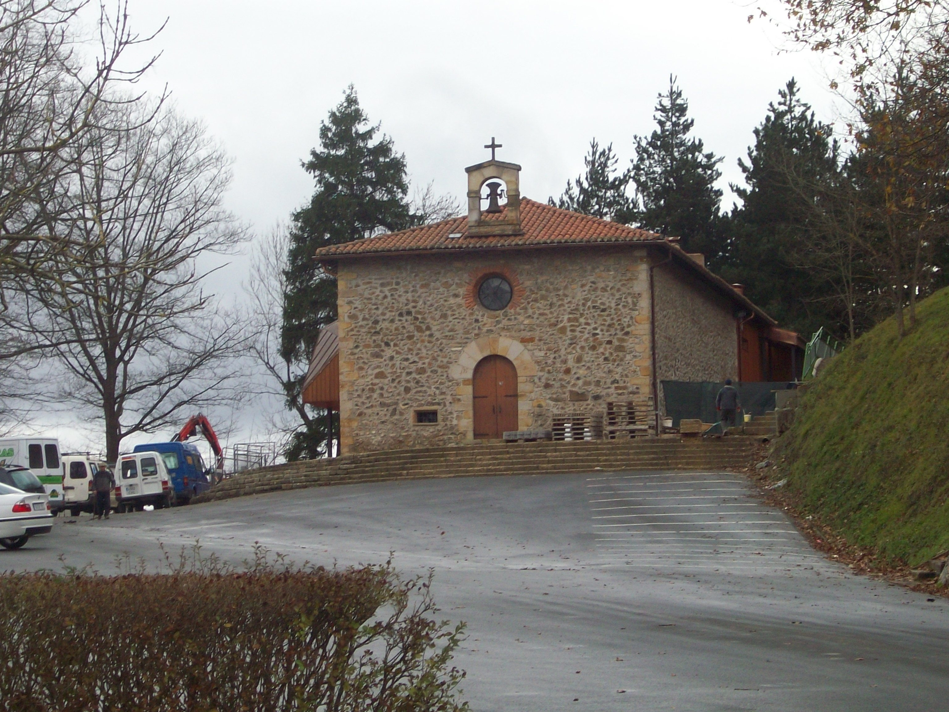 Urretxuko Santa Barbara baseliza. Gipuzkoa, Euskal Herria.